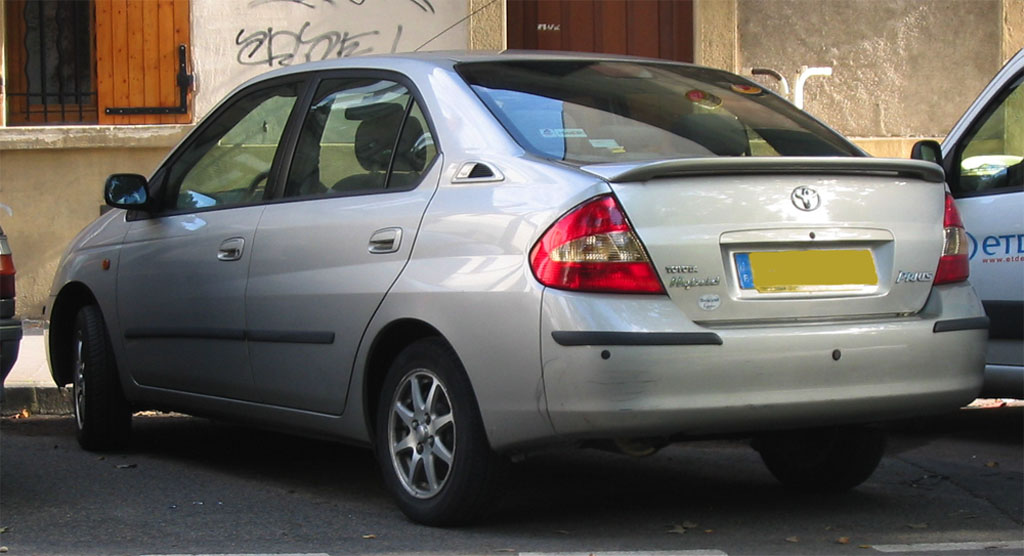 Toyota Prius photographiée à Lyon, France